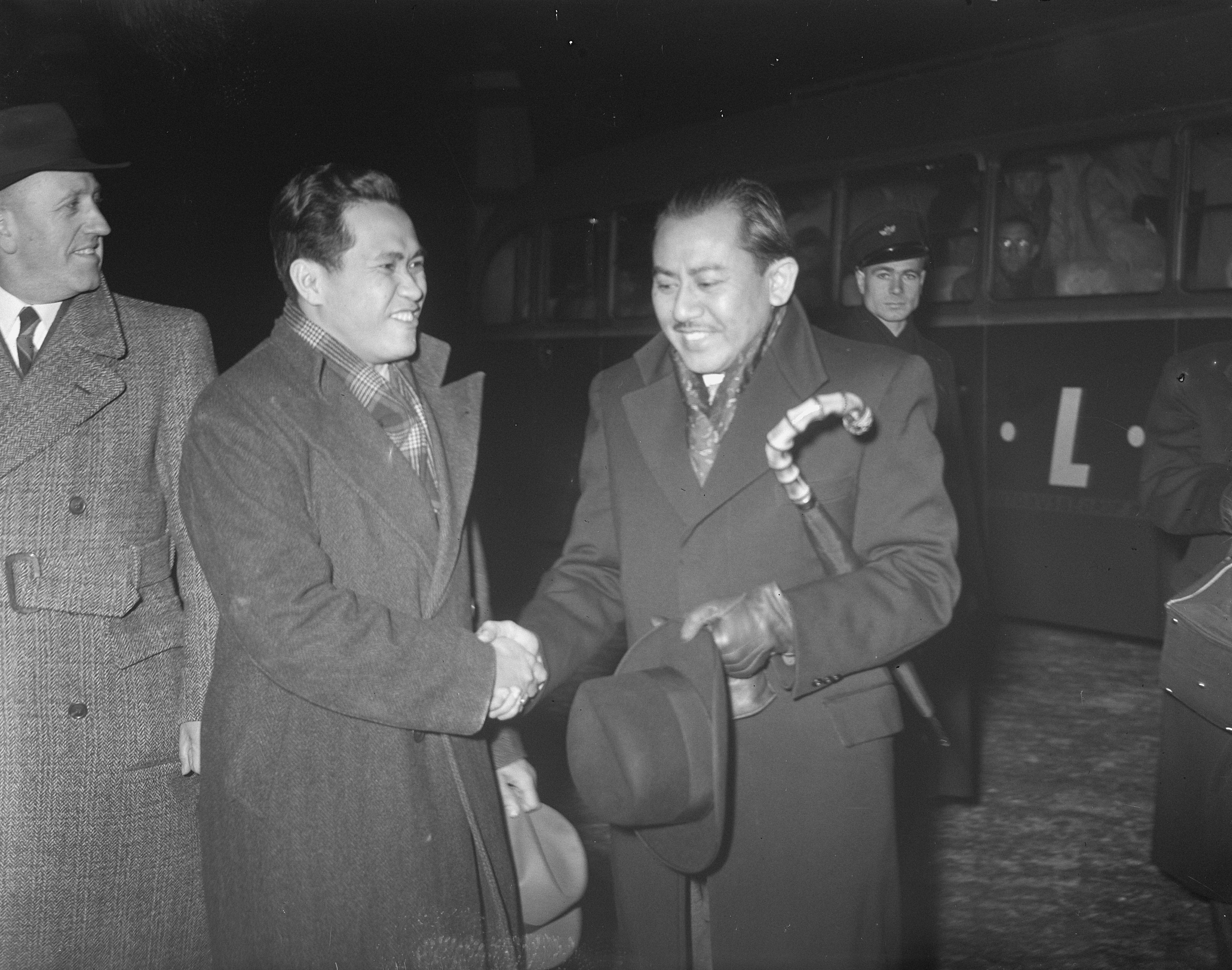 Aankomst Moh Rum op Schiphol